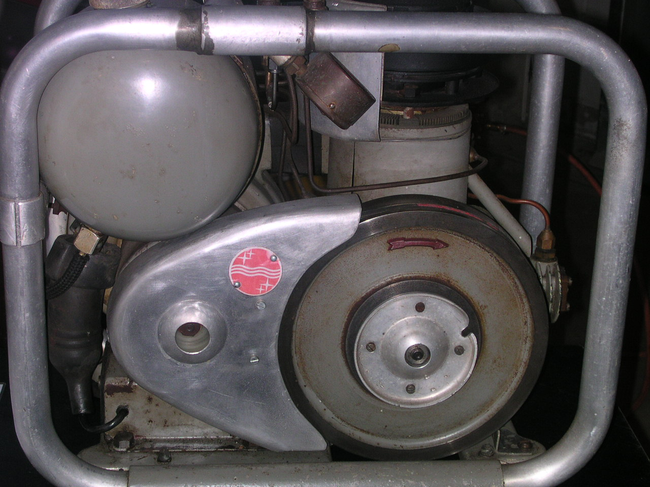 Kerkrade, Industrion, Philips-Stirlingmotor mit 180 W, Baujahr 1953